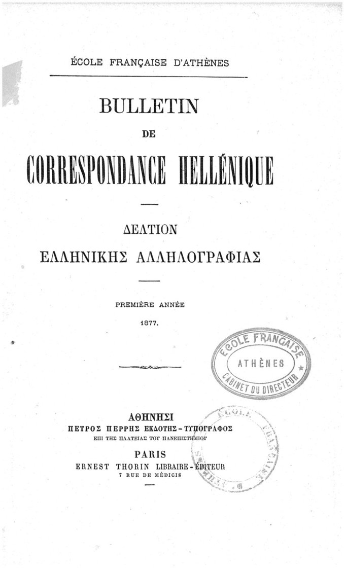 Εξώφυλλο του πρώτου τεύχους του Bulletin de correspondance hellénique